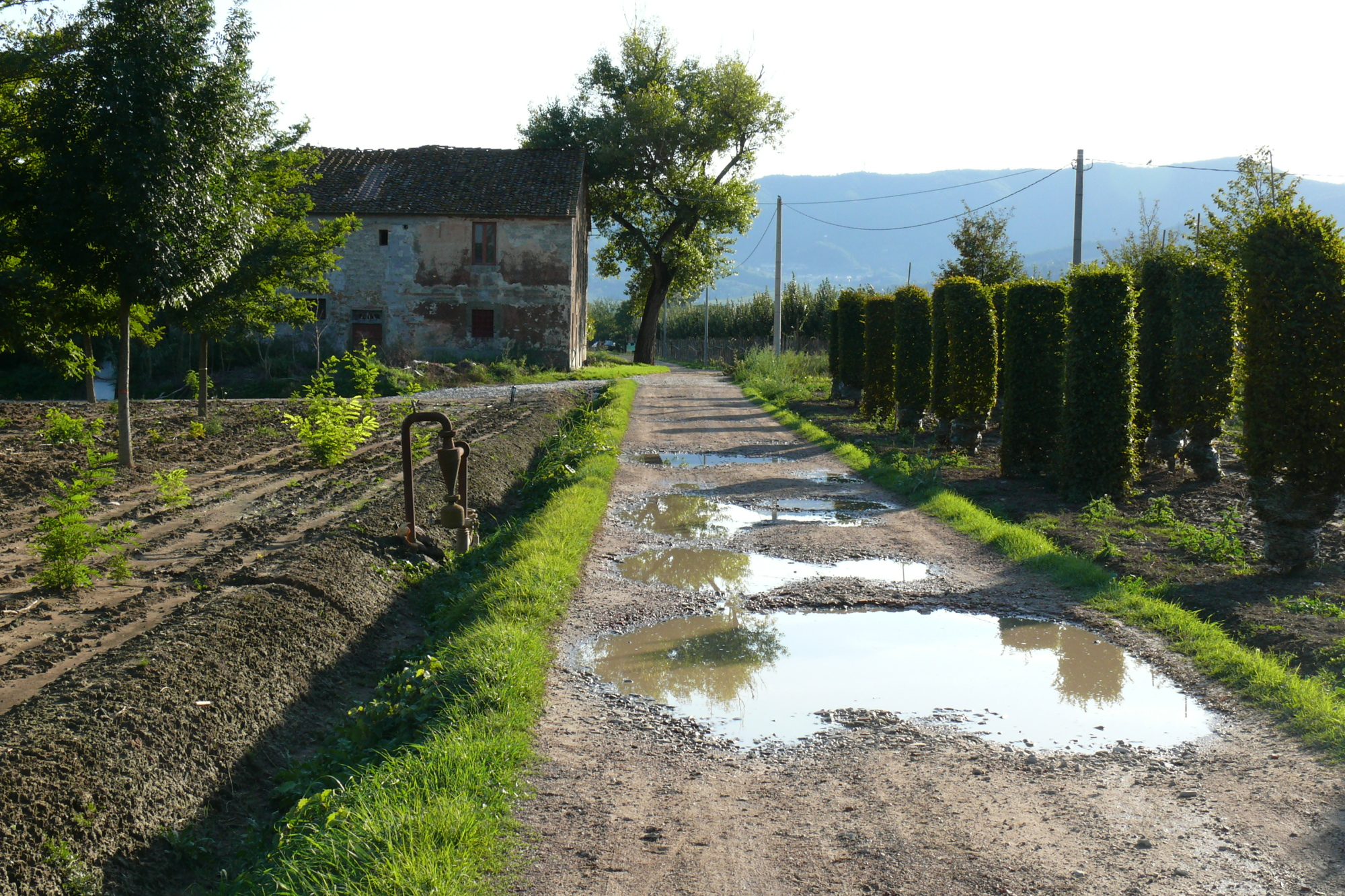 Casolare nella zona del Coderino.